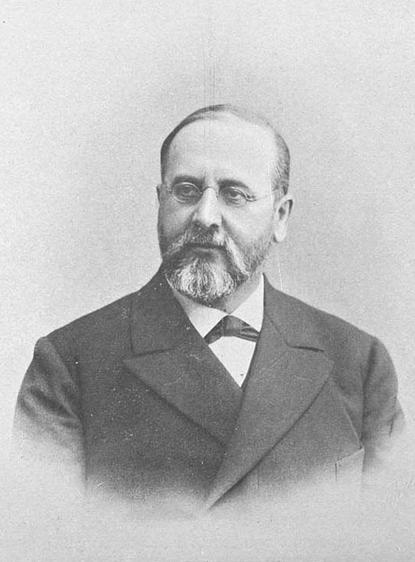 барон Александр Александрович Икскуль фон-Гильденбандт, русский государственный деятель, член Государственного Совета.